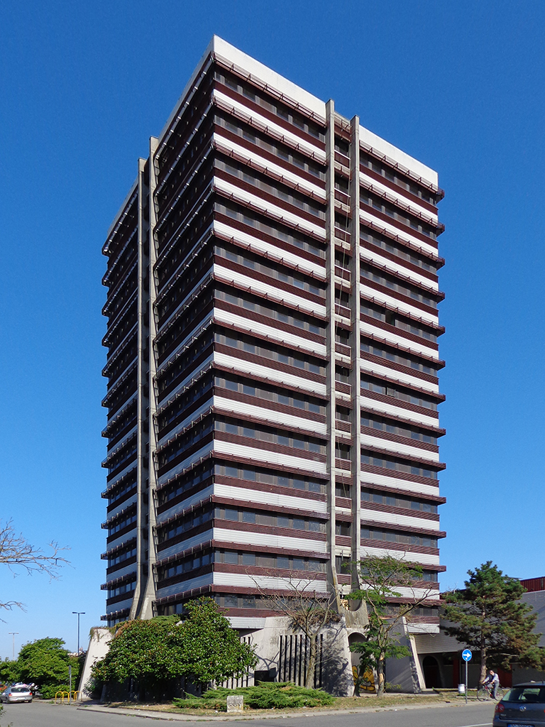 Lodi, la torre del centro commerciale prima dei lavori di ricostruzione come torre Zucchetti.